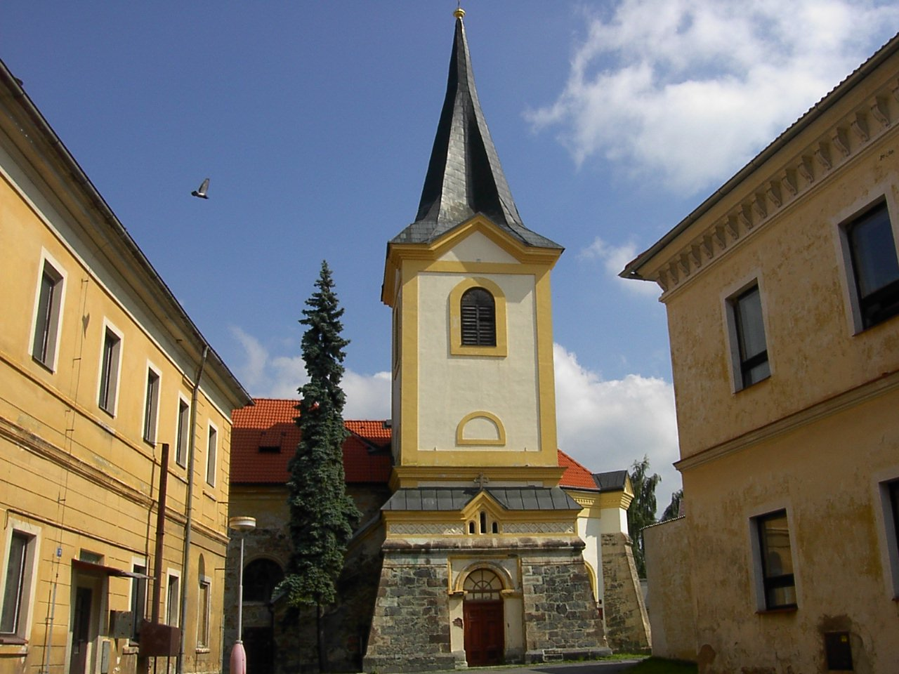 Church of the Assumption in village Bezdruzice, Czech Republic. Kostel Nanebevzetí P.Marie v Bezdružicích